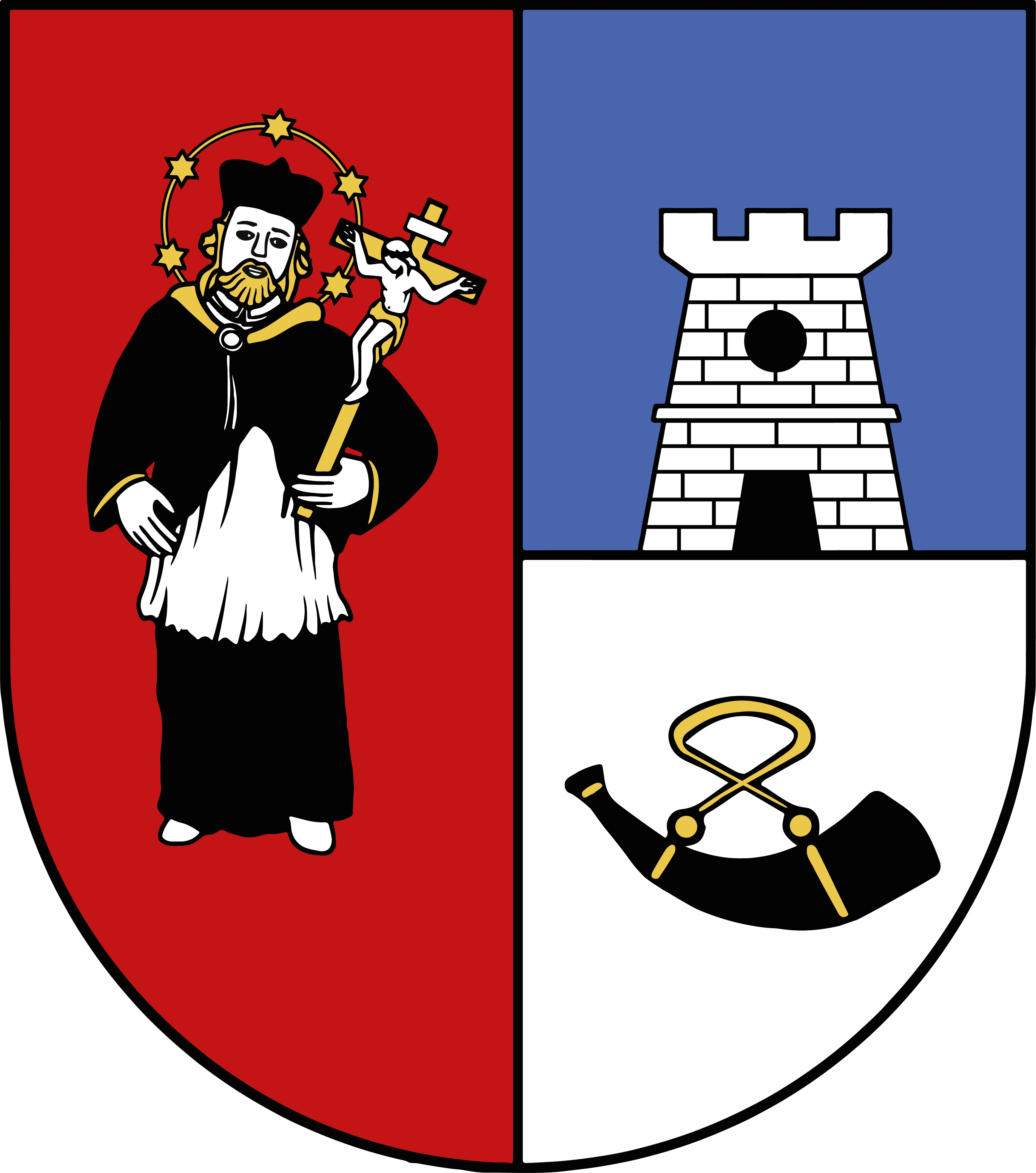 Znak obce Sudslava